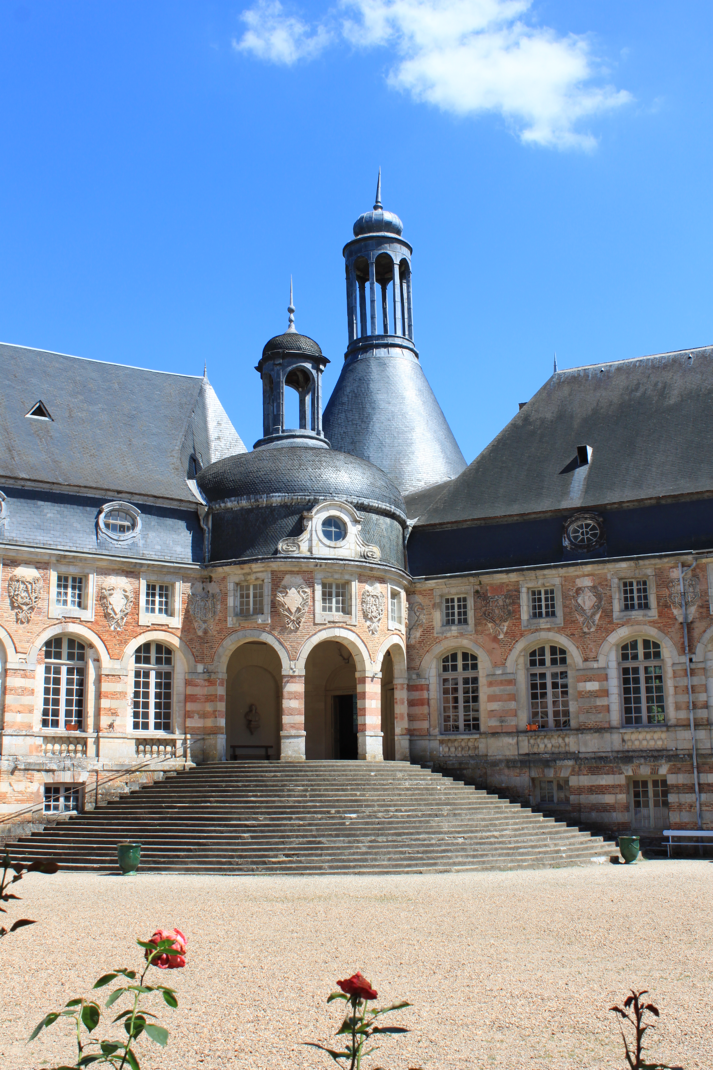 Château de Saint-Fargeau, Saint-Fargeau, Yonne, Bourgogne, France